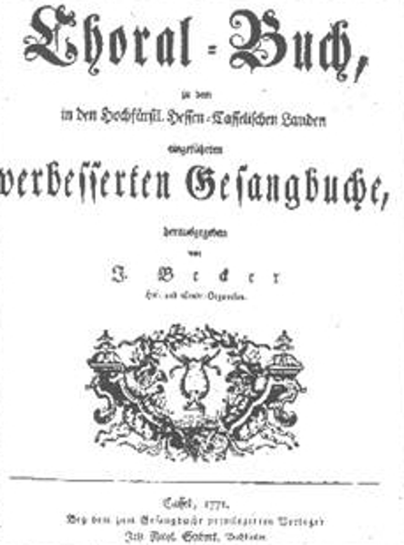 Choralbuch